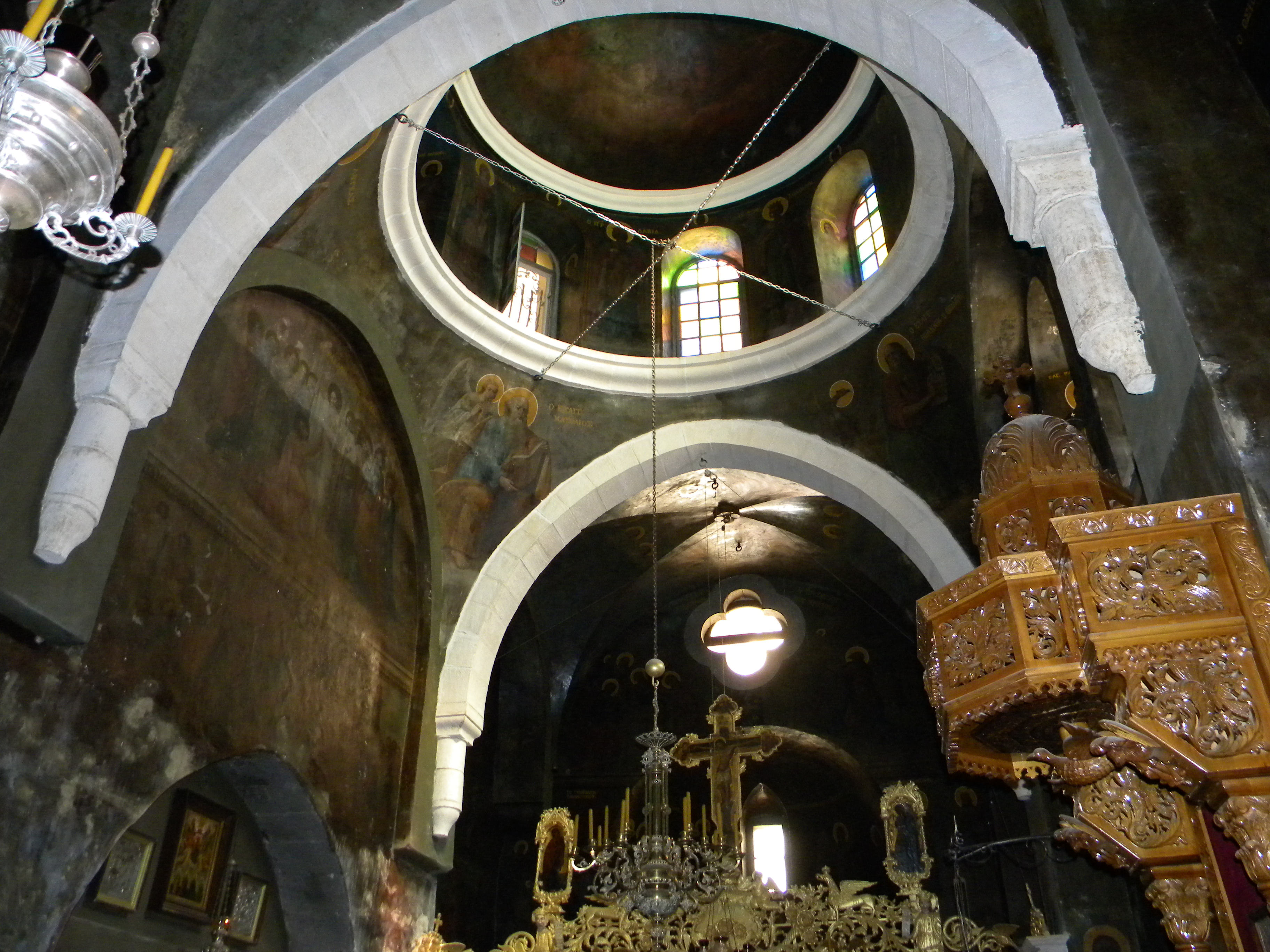 Palestine, Wadi Qelt, (Valea Hozevei) (St. George's Monastery having the relics of Sf. Ioan Iacob Hozevitul) (13)